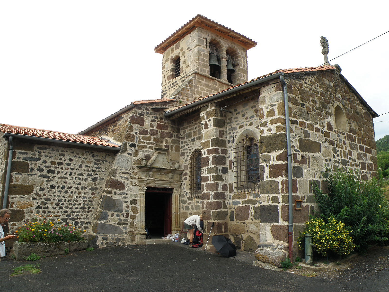 Saint-Geneys-près-Saint-Paulien, dép. de Haute-Loire, France (Auvergne). Église romane Saint-Barthélemy.